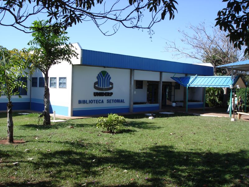 Biblioteca.